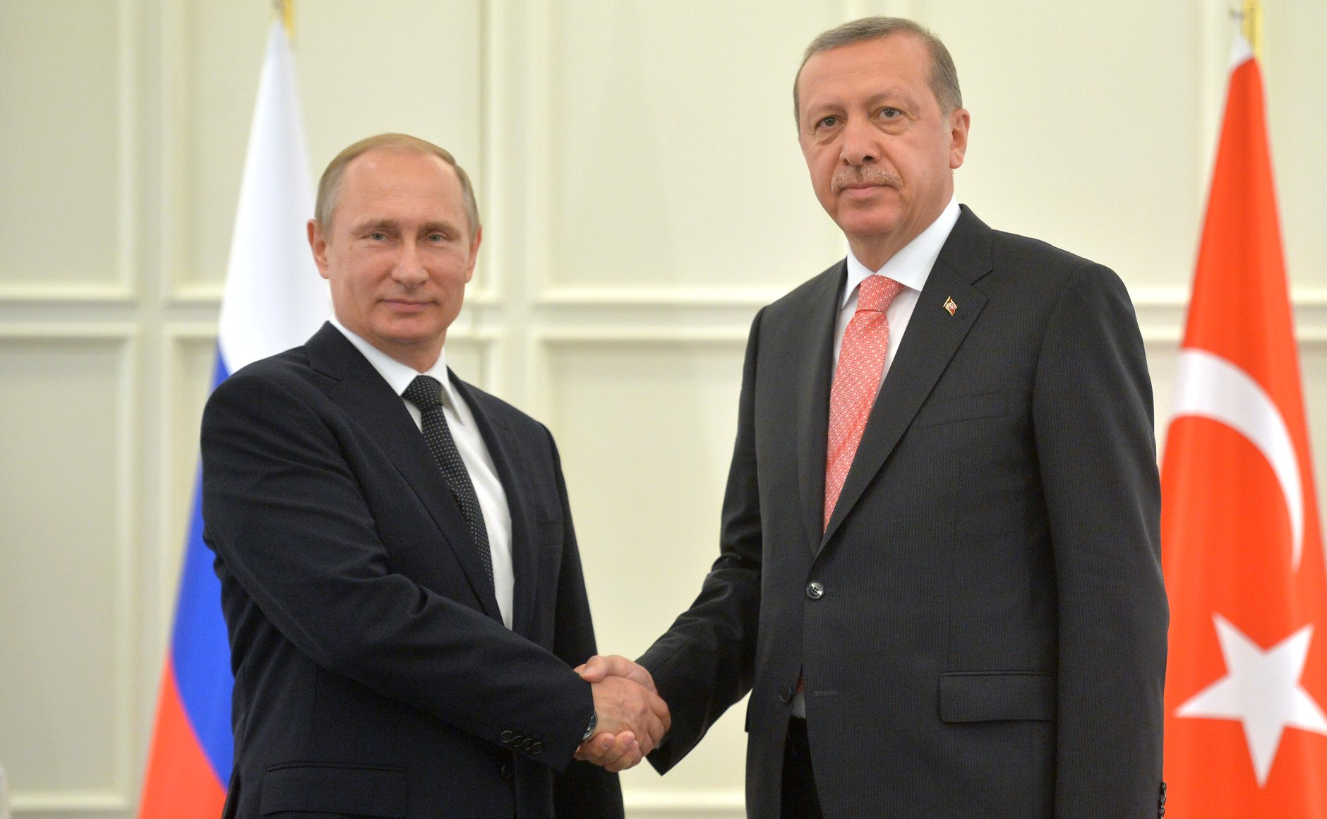 Встреча Президента России Владимира Путина с Президентом Турции Реджепом Тайипом Эрдоганом в Баку